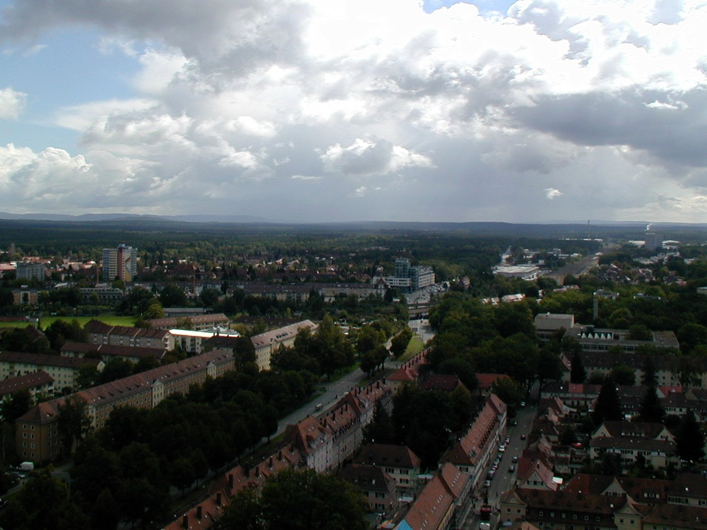 Zerzabelshof und der Reichswald, rechts de Bahnhof Dutzendteich